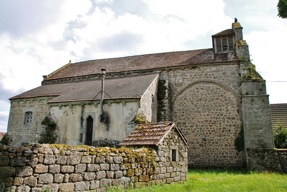 église St Blaise